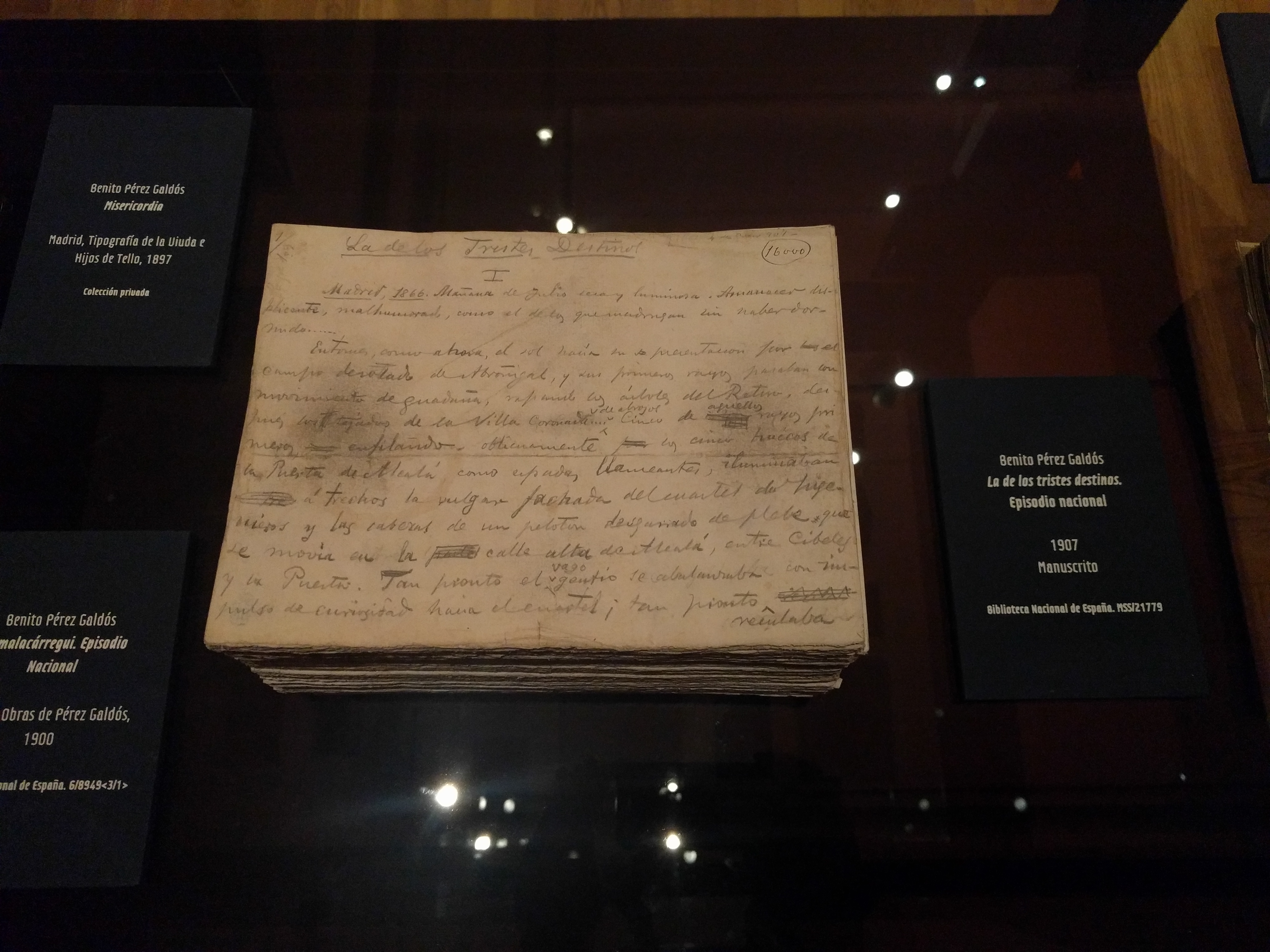 Manuscrito de La de los tristes destinos de Benito Pérez Galdós, 1907. Biblioteca Nacional de España.